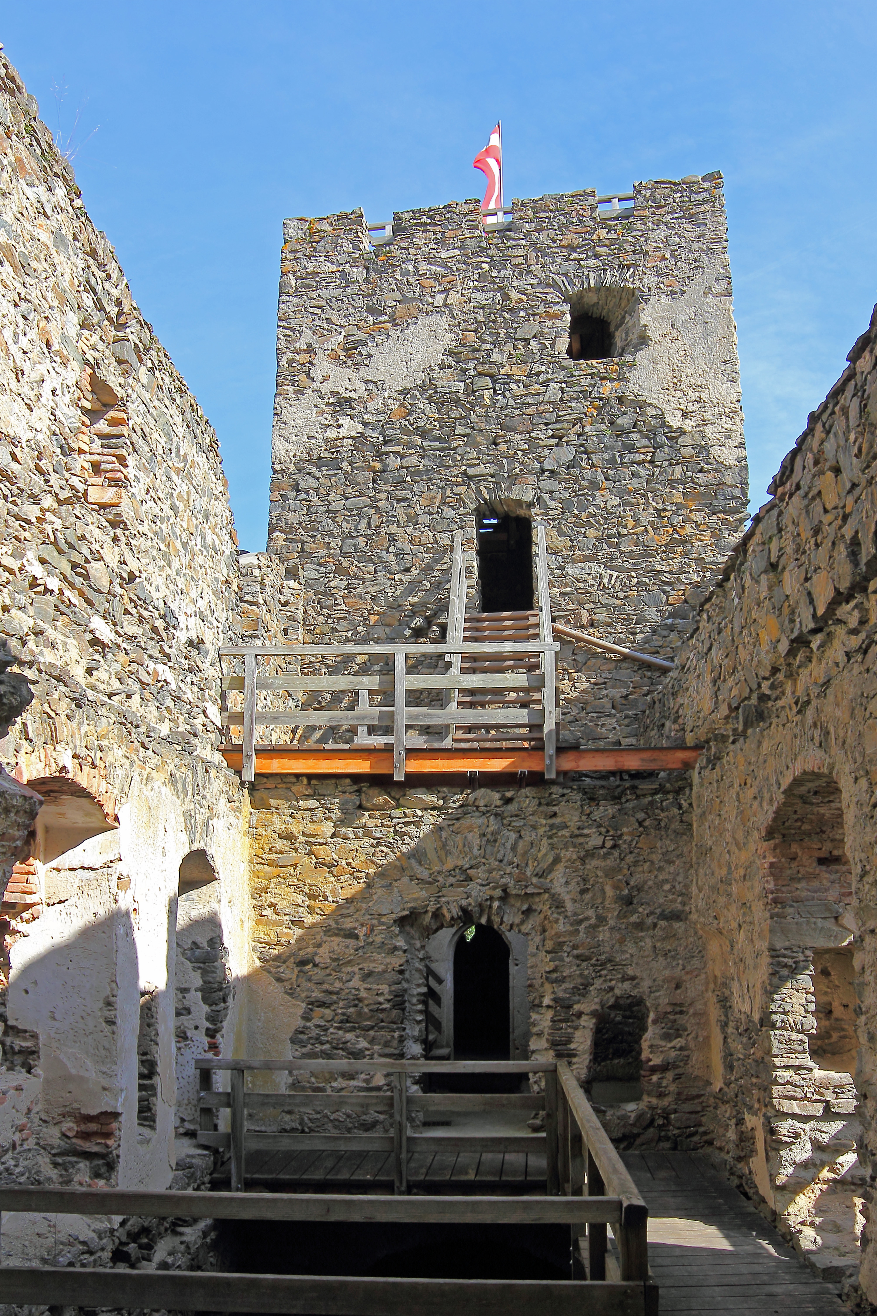 Burgruine Kronsegg aus dem 13. bis 15. Jahrhundert